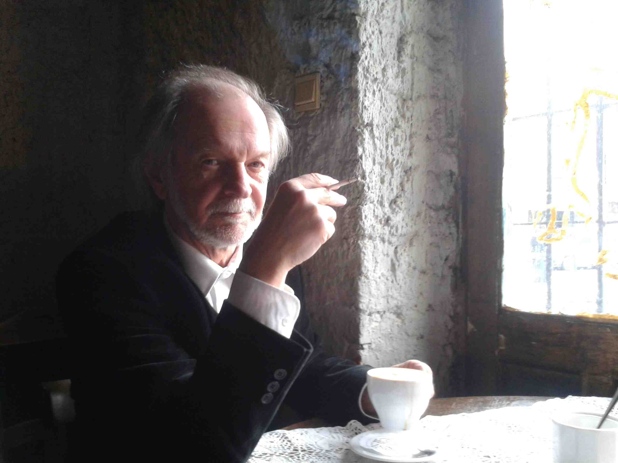 Tekściarz, recenzent teatralny, publicysta, felietonista, scenarzysta i reżyser widowisk teatralnych, tanecznych i muzycznych.